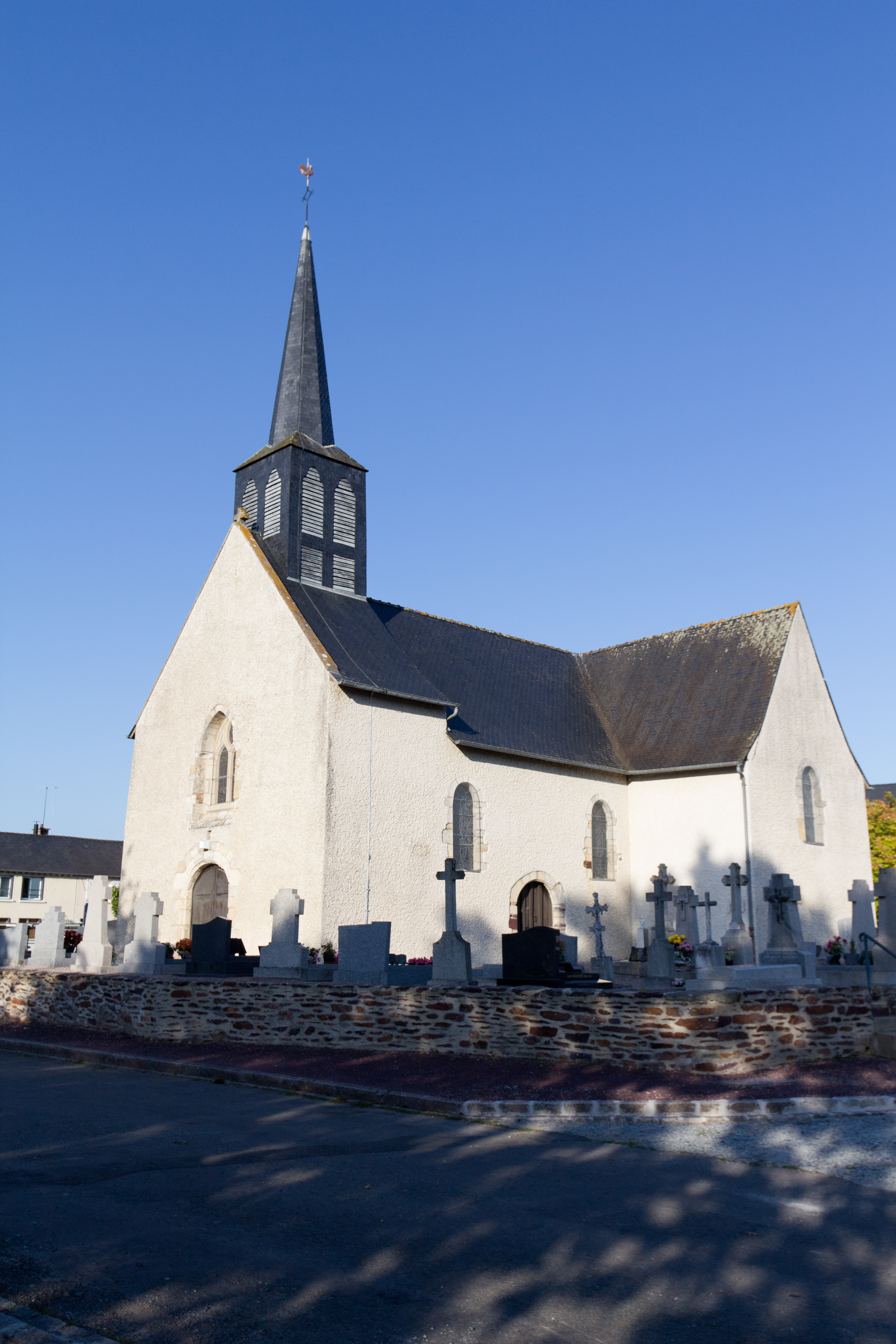 L'église Saint-Melaine de Moigné (section de commune du Rheu), entourée de son cimetière. .